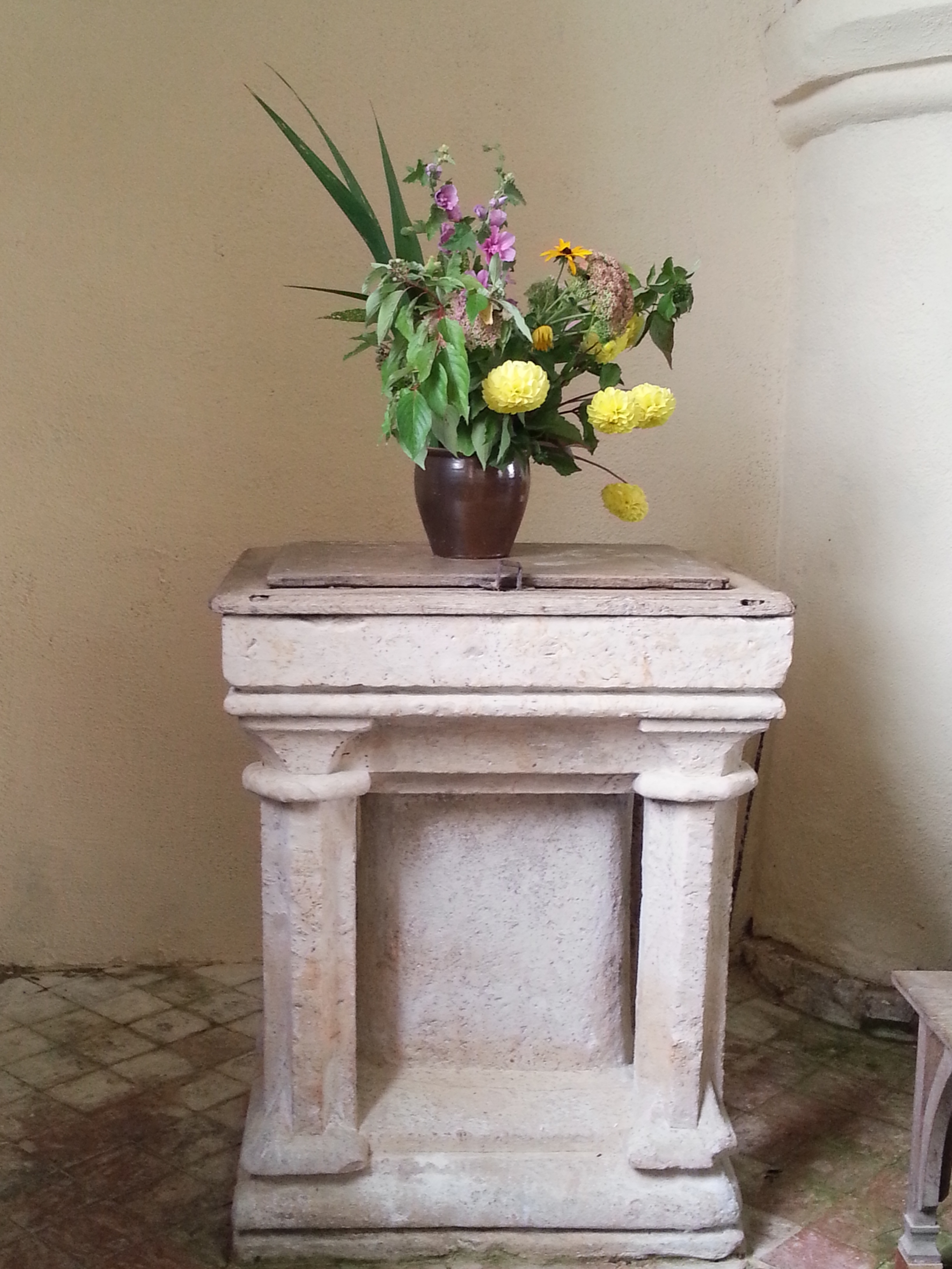 Fonts Baptismaux de l'église Saint-Jean-Baptiste de Romescamps